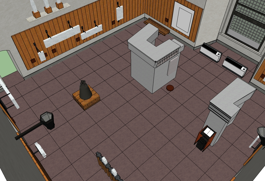 Vista dall'alto 3D